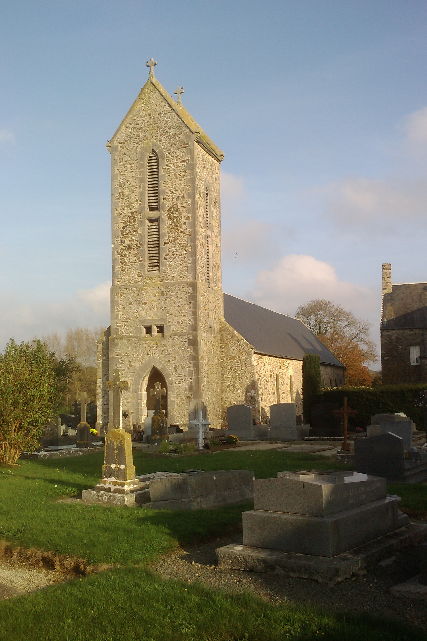 Église Saint-Nicolas de Boisroger